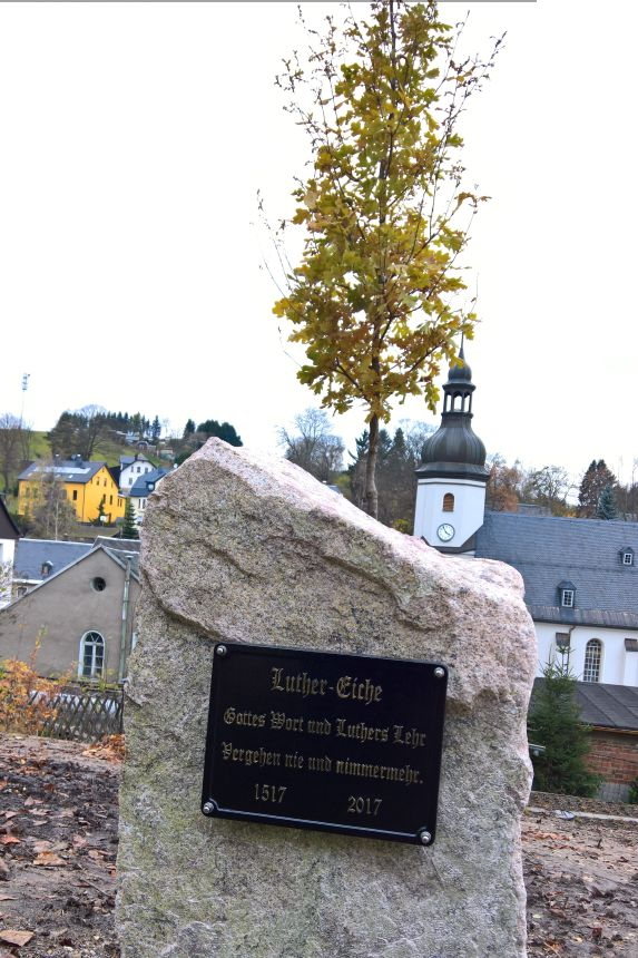 Alter Friedhof (Schönheide): Einen Luther-Baum, eine Eiche, pflanzte die evangelisch-lutherische Kirchgemeinde am 31. Oktober 2017 zur 500jährigen Wiederkehr des Reformationsanlasses, des vermuteten Anschlags von 95 Thesen an die Schloßkirchentür in Lutherstadt Wittenberg durch Martin Luther.